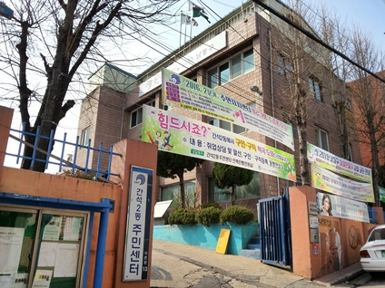 간석2동 주민센터